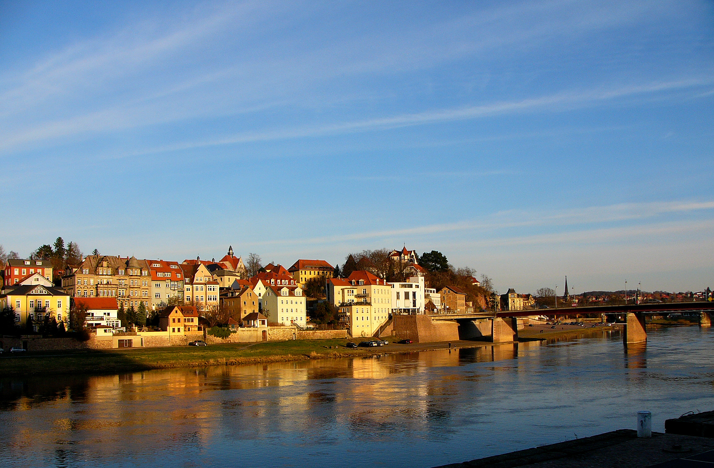 Meißens Stadtteil Vorbrücke.